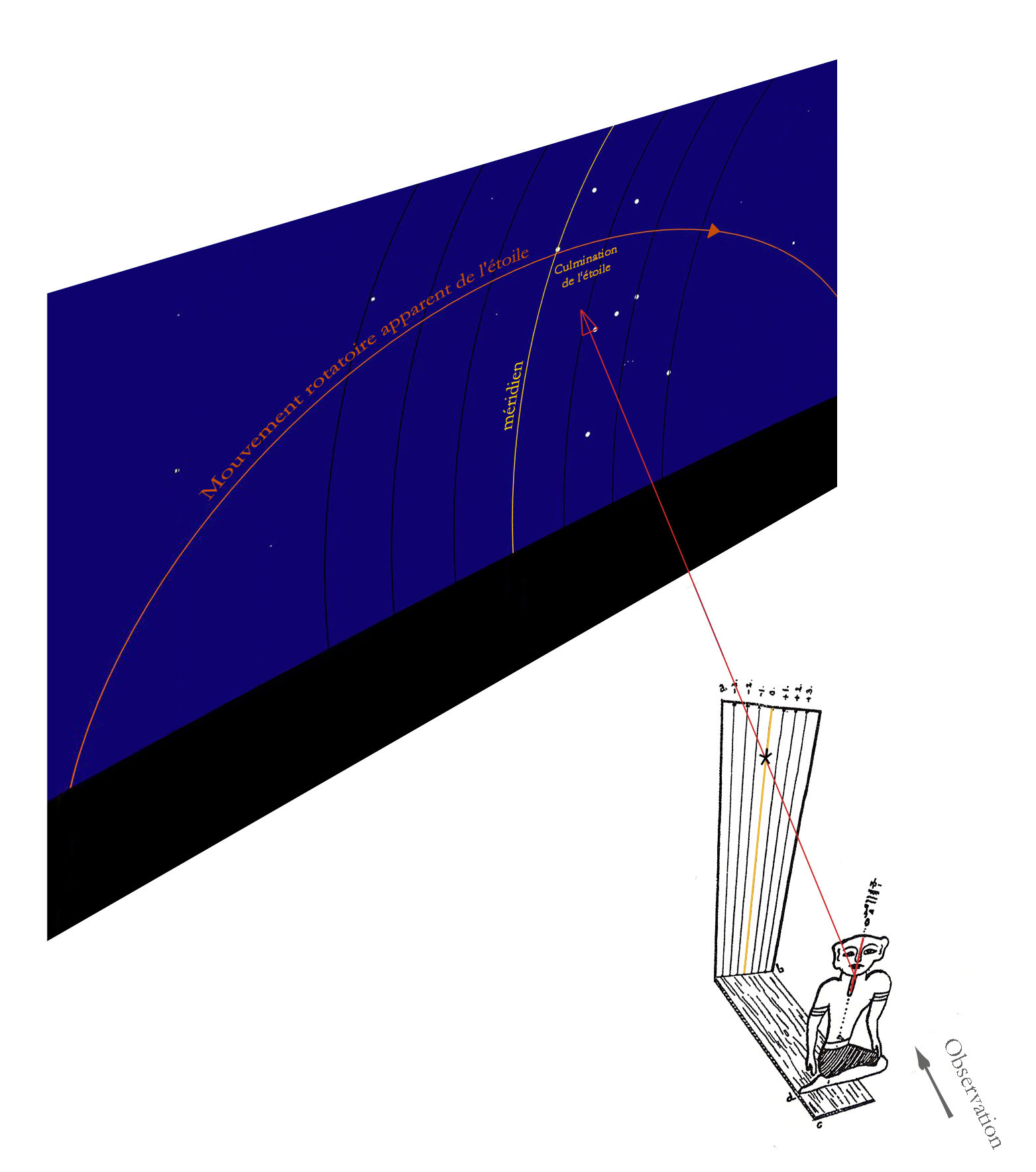 Fonctionnement d'une horloge ramesside. Adaptation d'une reconstitution de H. Schack-Schackenburg (ägyptologische Studien (1902)